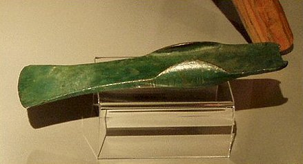 Mittelständiges Lappenbeil aus der Archäoligischen Sammlung des Stadtmuseums Wels